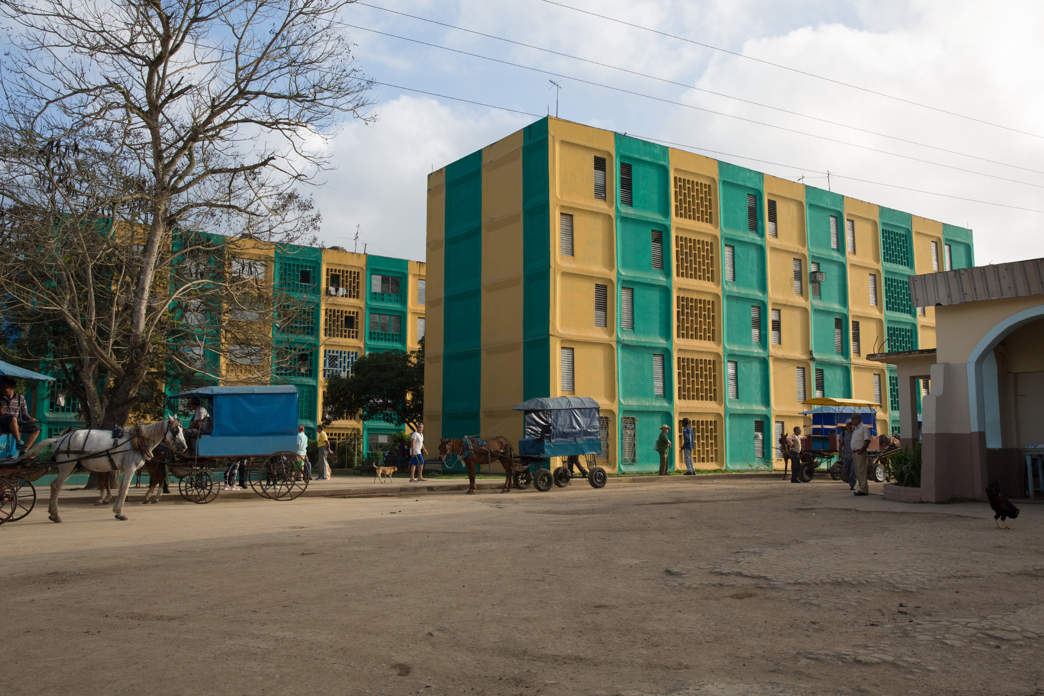 Mayarí arriba, municipio II. Frente, Santiago de Cuba